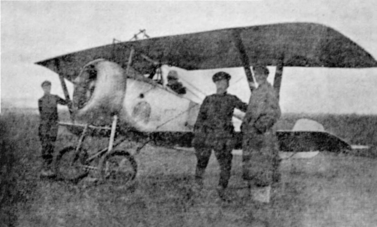 Зображення аероплану Української Галицької Армії Льотчик Сильвестр Соневицький за штурвалом літака «Ньюпор»-17, 1-а летунська сотня, м. Красне, початок 1919 р. Фото з часопису «Літопис Червоної Калини»